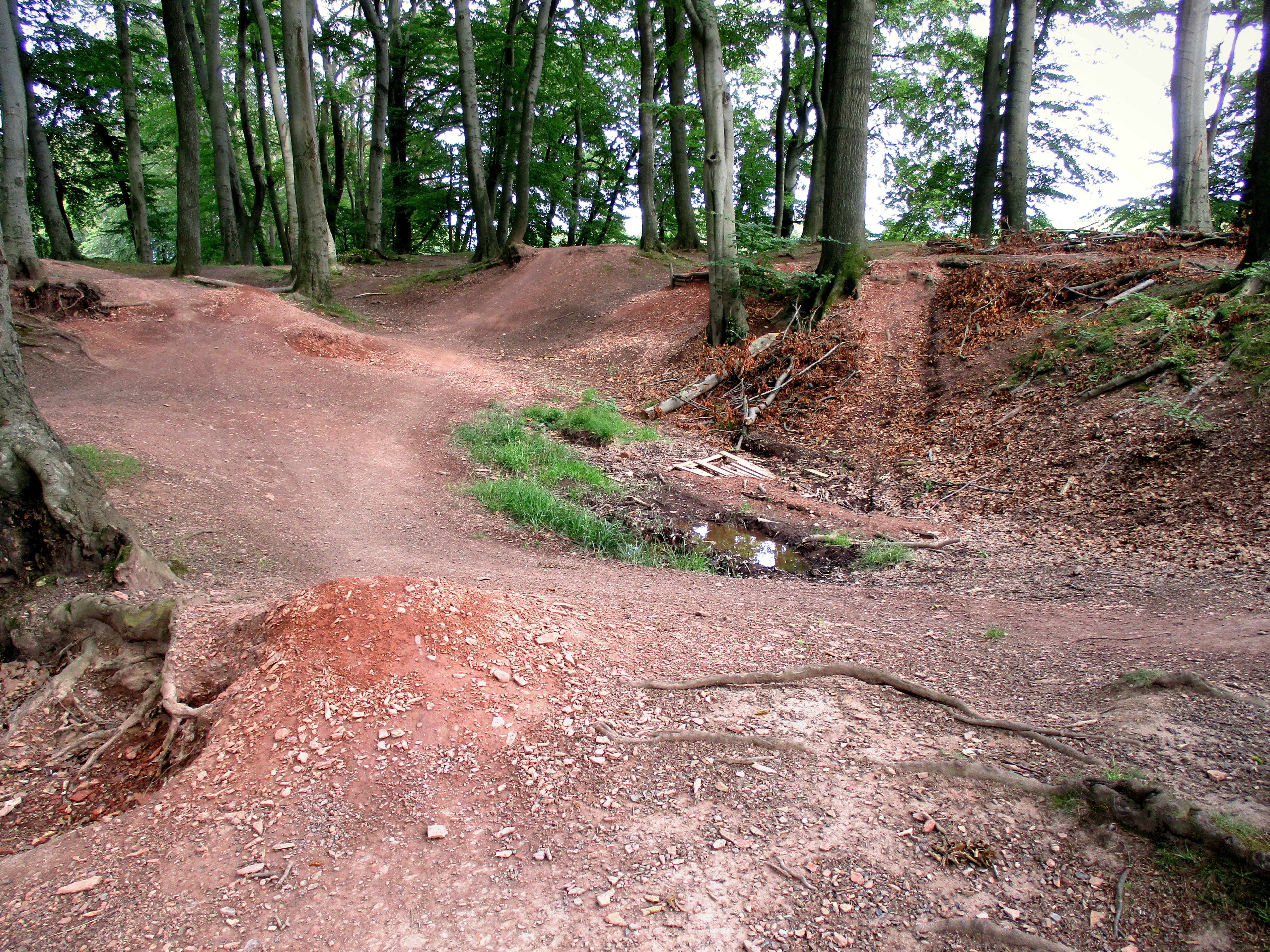 Hardenbergischer Alaunsteinbruch „Alaunloch“. Dort wurde früher Alaunschiefer abgebaut. Er liegt am Hohlweg, einer alten Hauptstraße, welche bereits im Mittelalter die Ortschaften Wallmichrath, Kuhlendahl und Windrath verband.